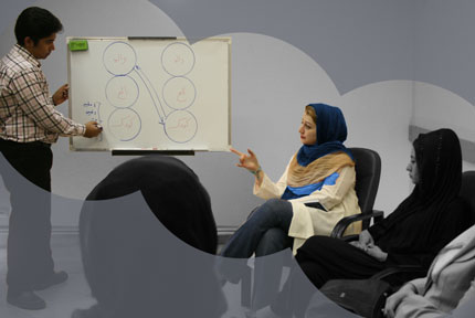 تصویری از کلاس